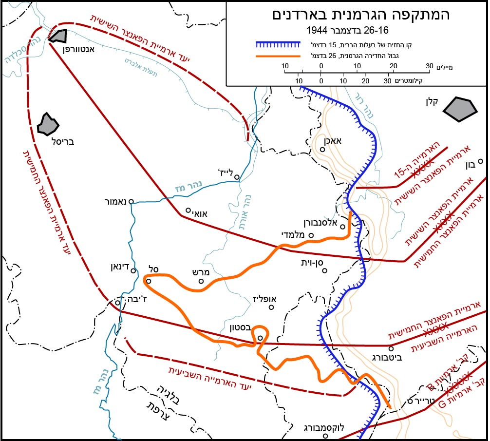 מפת קרב הבליטה